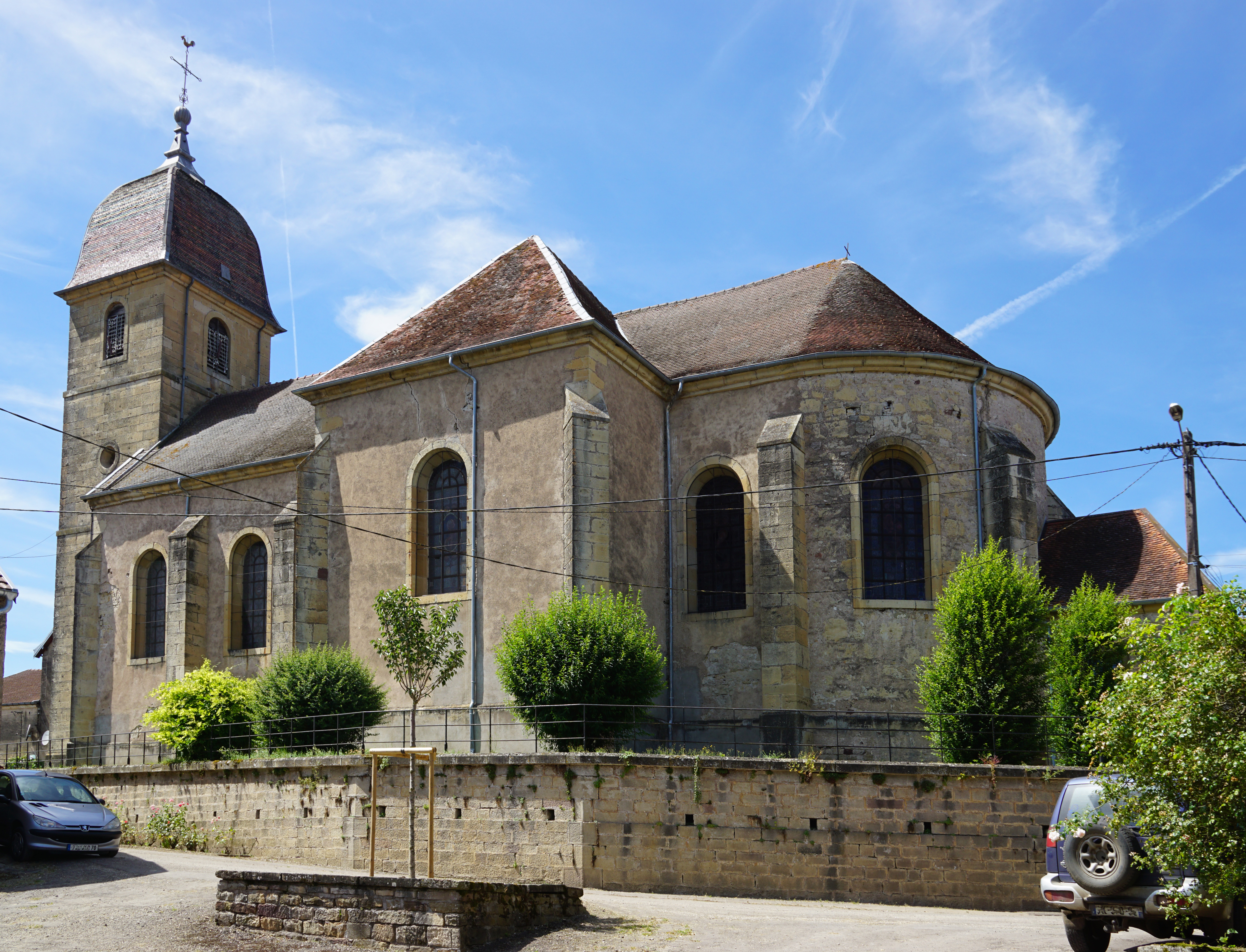 Église Saint-Pierre de Villers-lès-Luxeuil.